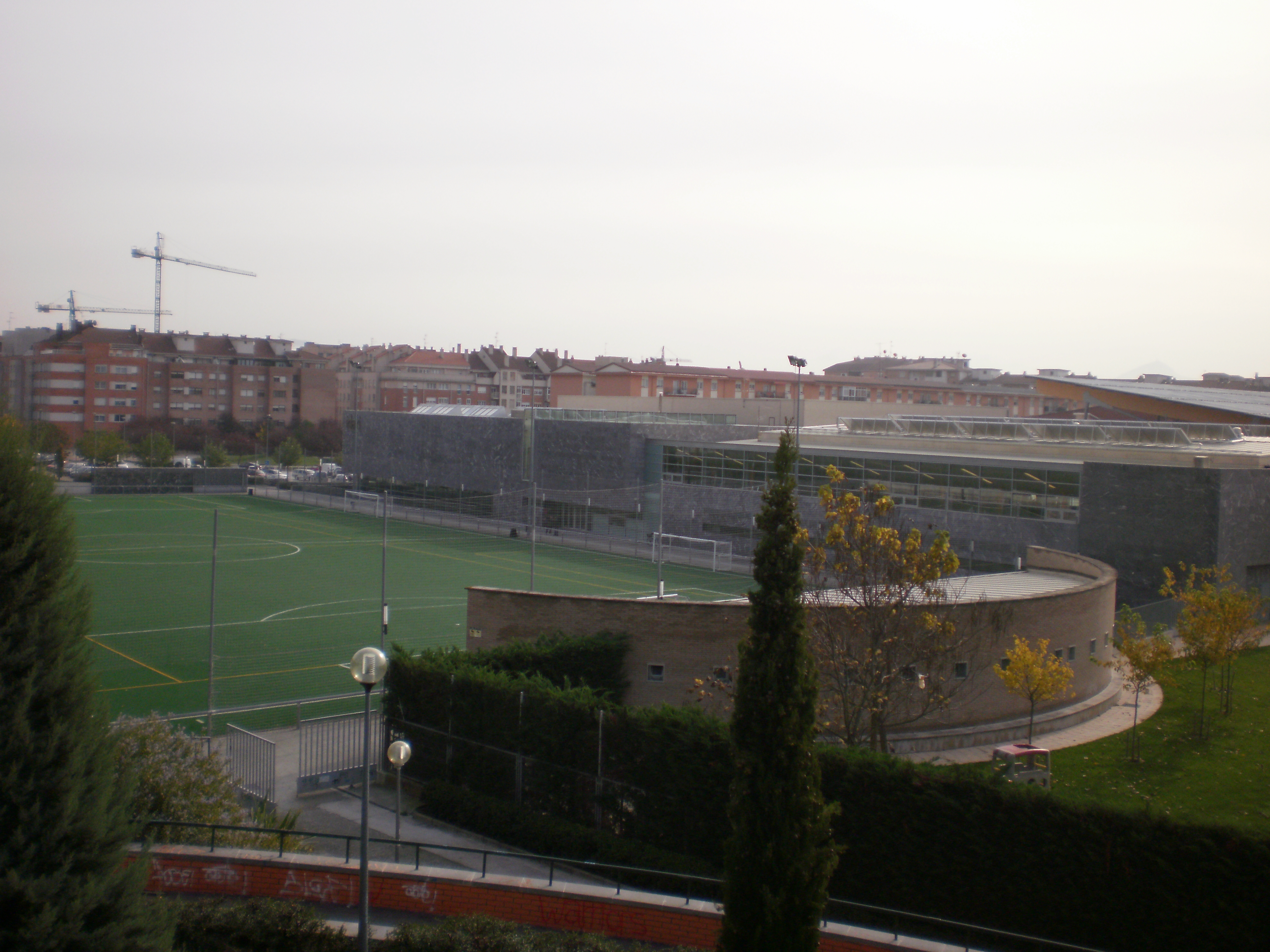 Vista general de las instalaciones deportivas de Ansoáin